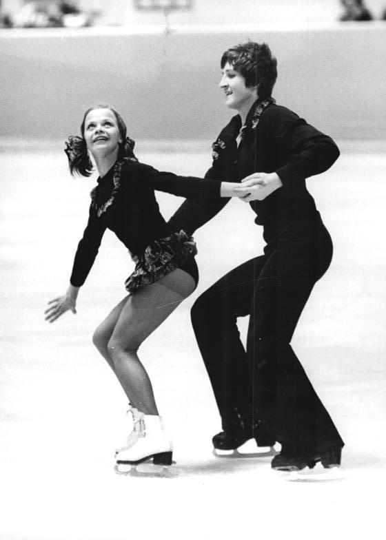 Manuela Mager, Uwe Bewersdorf ADN-ZB Reiche 14.1.1978 Karl-Marx-Stadt: Bei den DDR-Meisterschaften im Eiskunstlaufen sicherten sich am Nachmittag des 14.1.1978 Manuela Mager und Uwe Bewersdorf (SC Einheit Dresden) mit einer ausgewogenen Kür den Meistertitel im Paarlaufen. (Archivfoto von einem früherem Wettkampf)